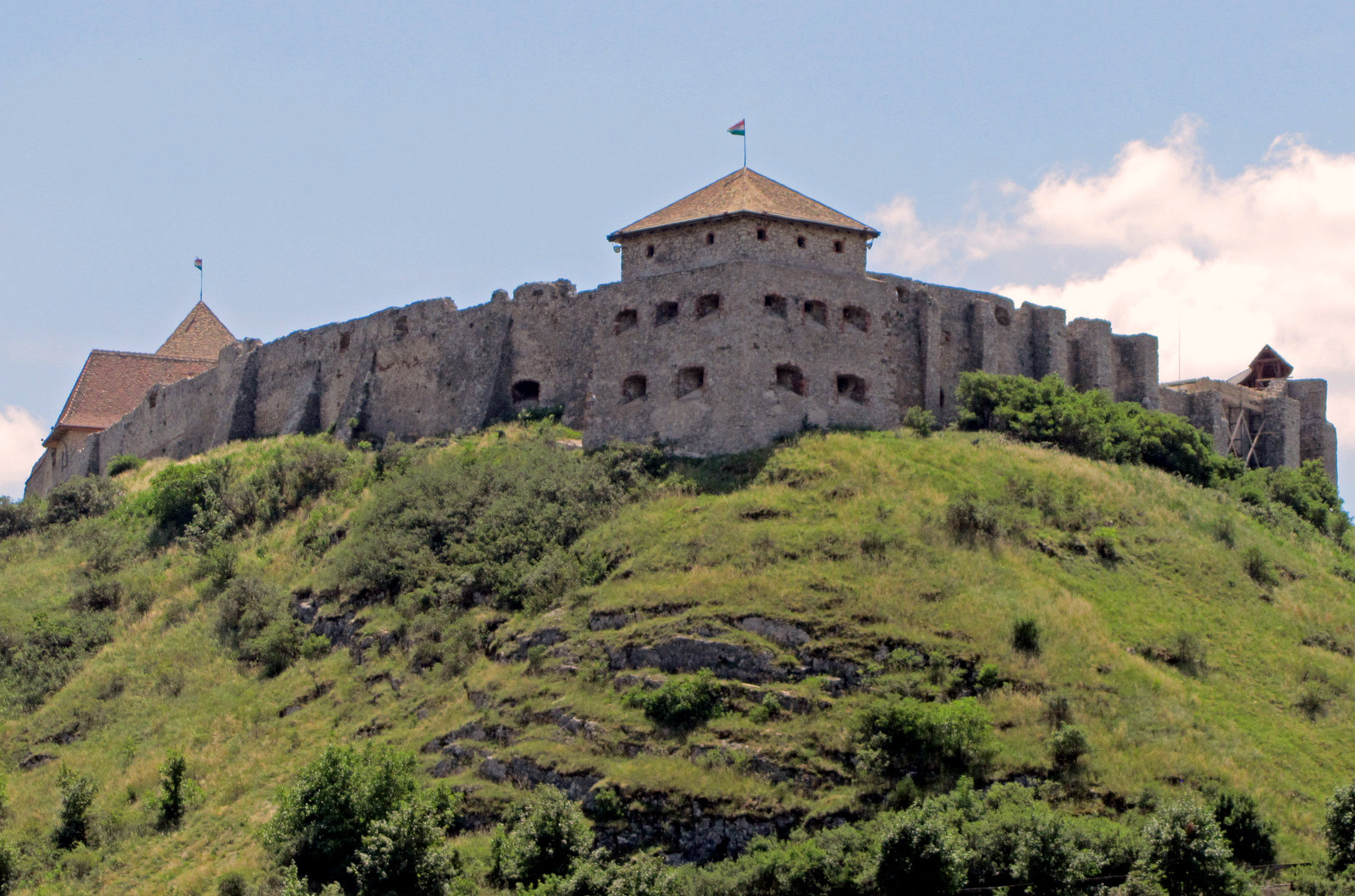 Várrom (Sümeg, ) This is a photo of a monument in Hungary. Identifier: 10292